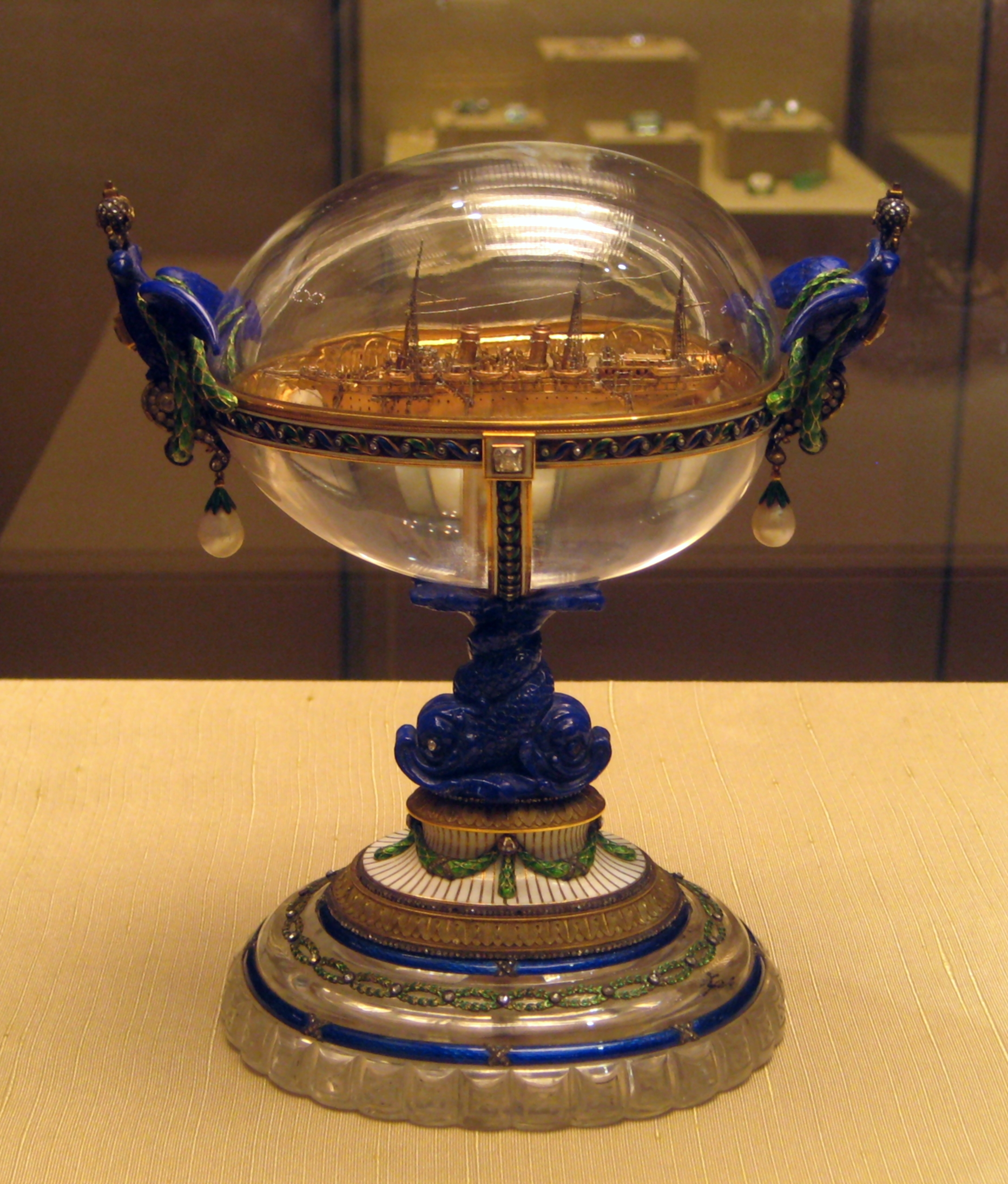 Яйцо Фаберже "Яхта Штандарт".